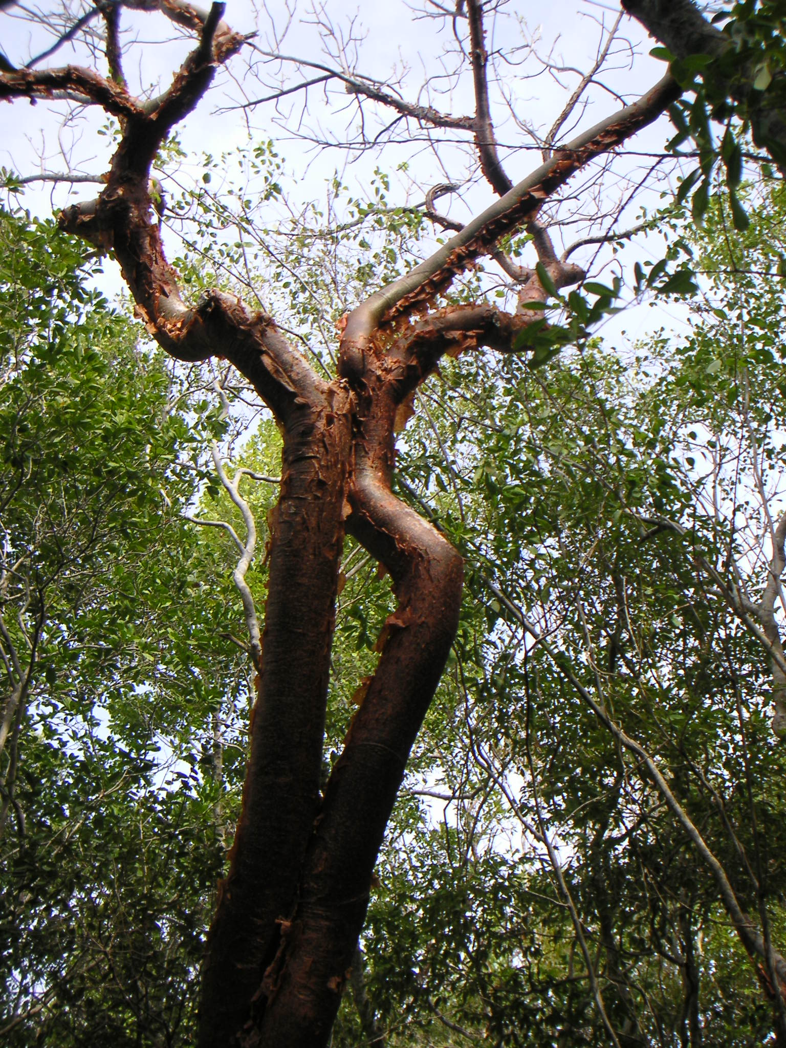 Bursera simaruba (Burseraceae)